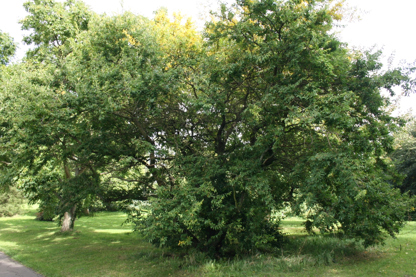 Hemiptelea davidii: Habit